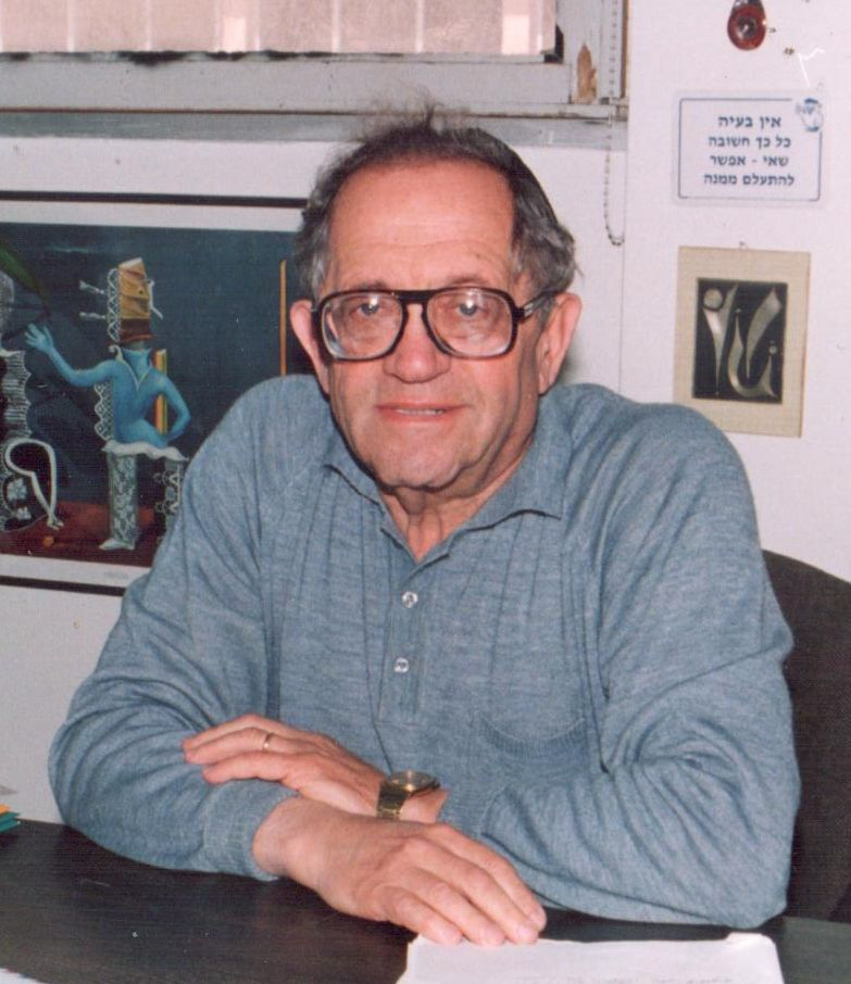 פרופסור יהודה אמיר